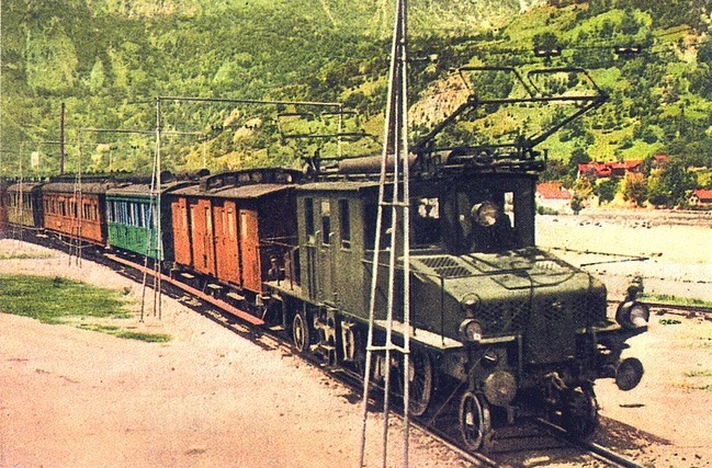 Simplon-Drehstrombetrieb: Die kolorierte Ansichtskarte zeigt den internationalen Simplon-Express (Paris-Mailand) mit einer der vorübergehend von der Valtellina-Bahn in Italien (Rete Adriatica) angemieteten Drehstromlokomotiven Fb 3/5 Nr. 361-363 von Ganz & Cie. in Budapest beim Tunneleingang in Brig. Die Lok trägt bereits nicht mehr die Original-Rollenstromabnehmer von Ganz, sondern wurde mit den verbesserten BBC-Doppelbügeln nachgerüstet.